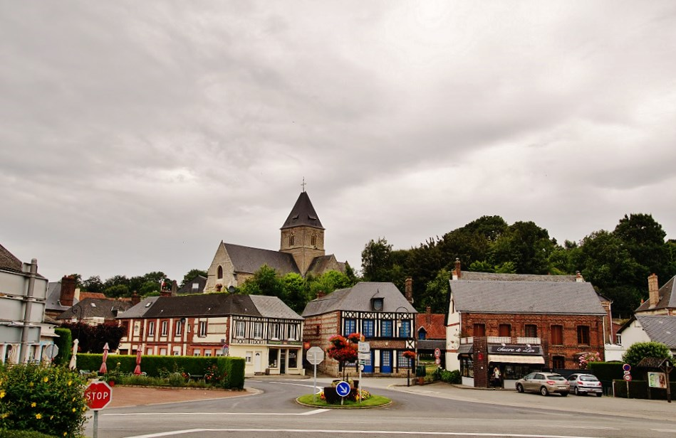 Le centre-bourg de Fontaine-le-Dun.